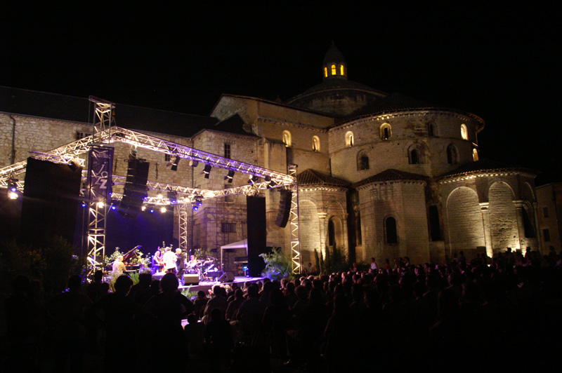 Souillac en Jazz - édition 2006. Concert du vendredi 21 juillet, donné place Pierre Betz par le Michel Portal - Louis Sclavis Quintet (Michel Portal s, cl - Louis Sclavis s, cl - Bruno Chevillon b - Éric Échampard d - Bojan Zulfikarpasic p)